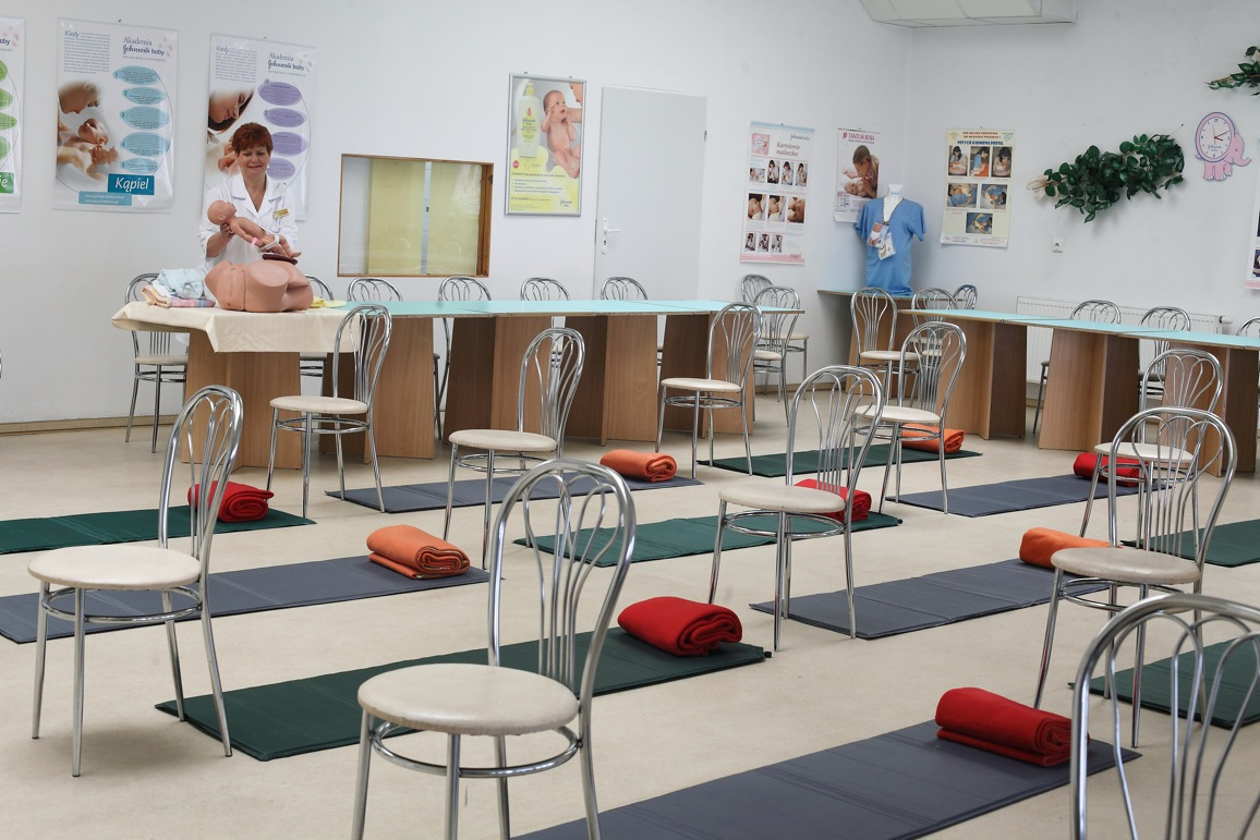 2007r. Szpitalna Szkoła Rodzenia